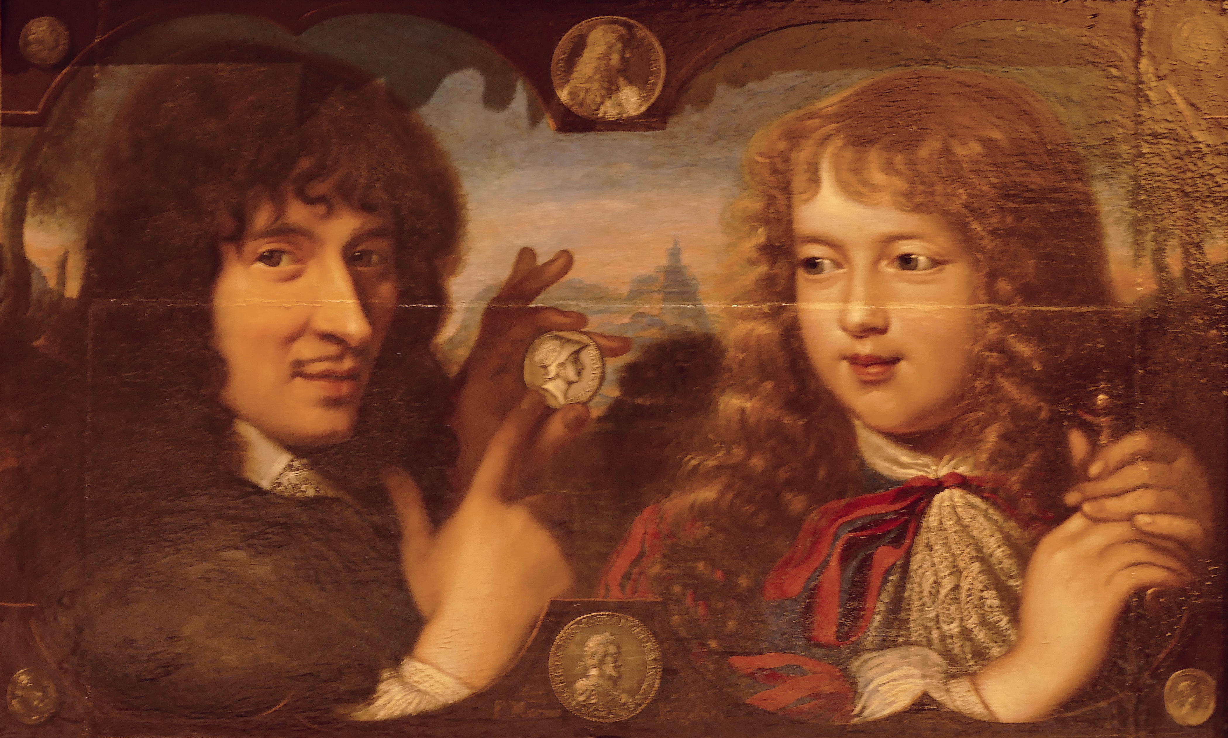 Jean Varin et Louis XIV enfant. Huile sur parchemin collé sur bois, peinture de François Lemaire, 1654, remanié vers 1660, 39 x 65 cm. Musée de la Monnaie, 11 quai de Conti, Paris.